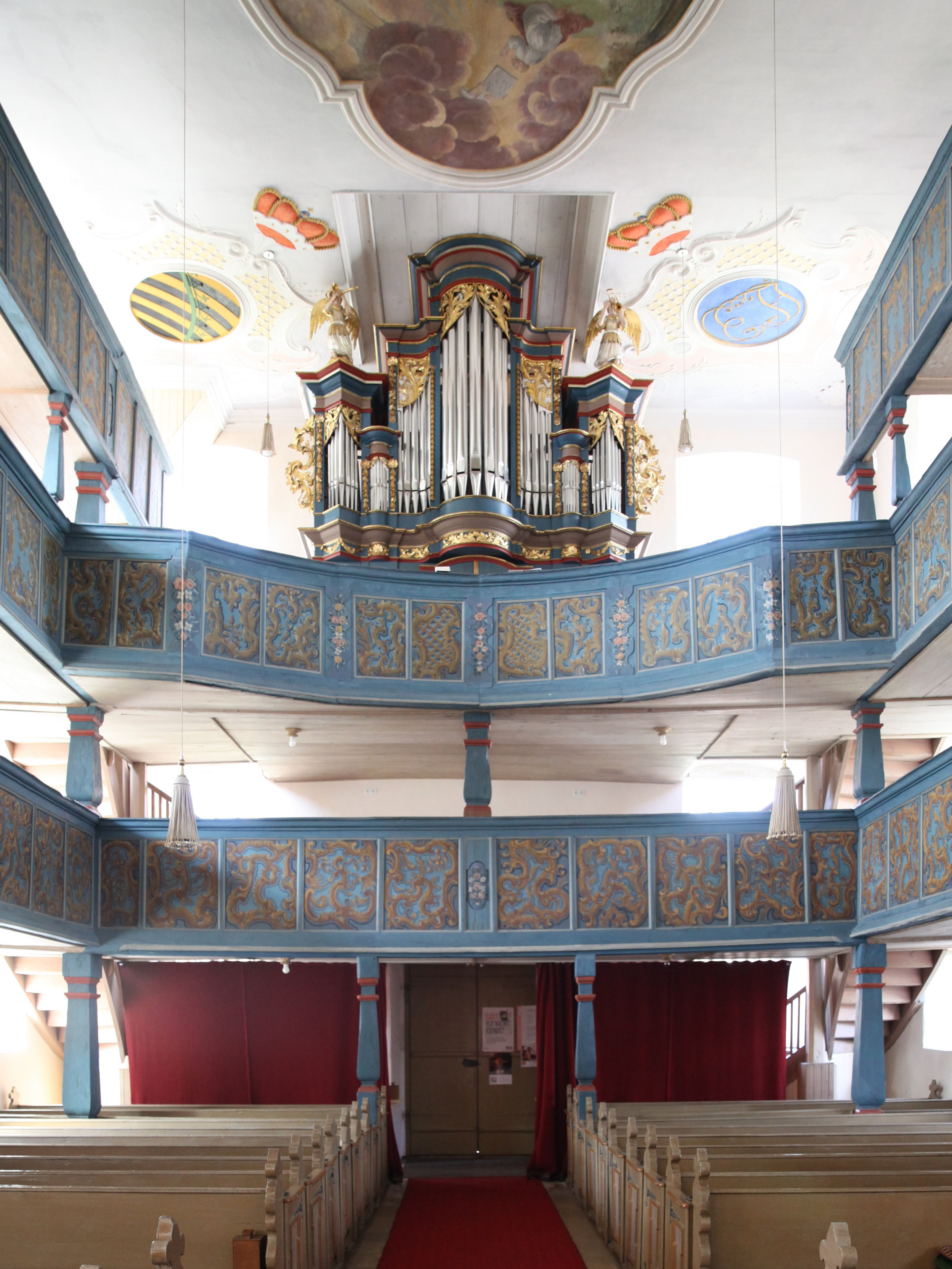 Innenraum, Evangelische Marienkirche in Watzendorf